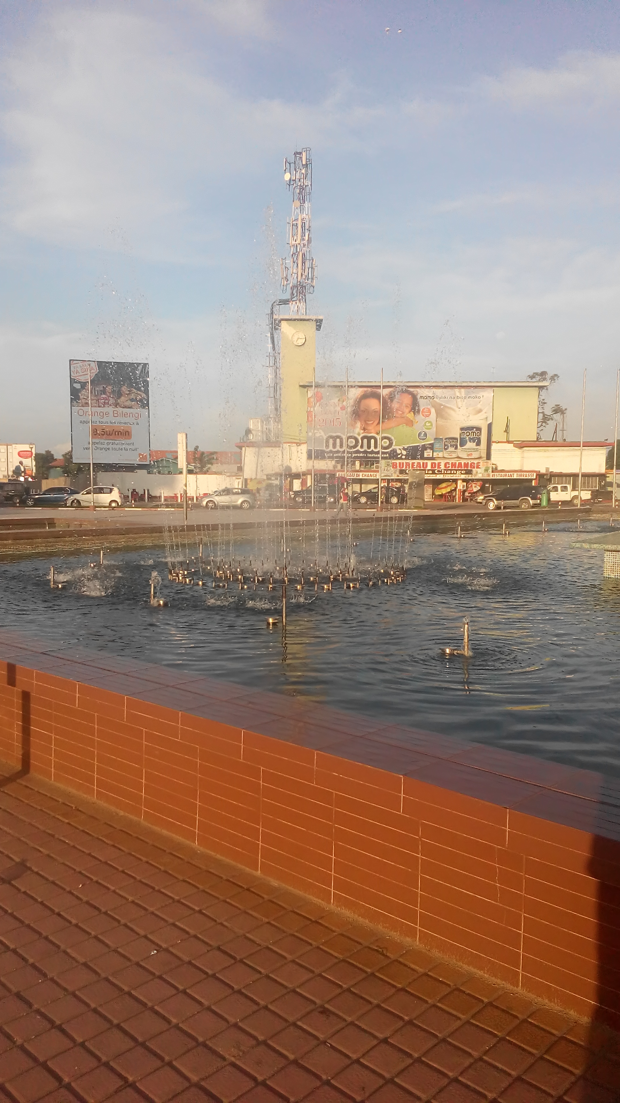 Gare centrale de Kinshasa au centre ville, vue de l'extérieur